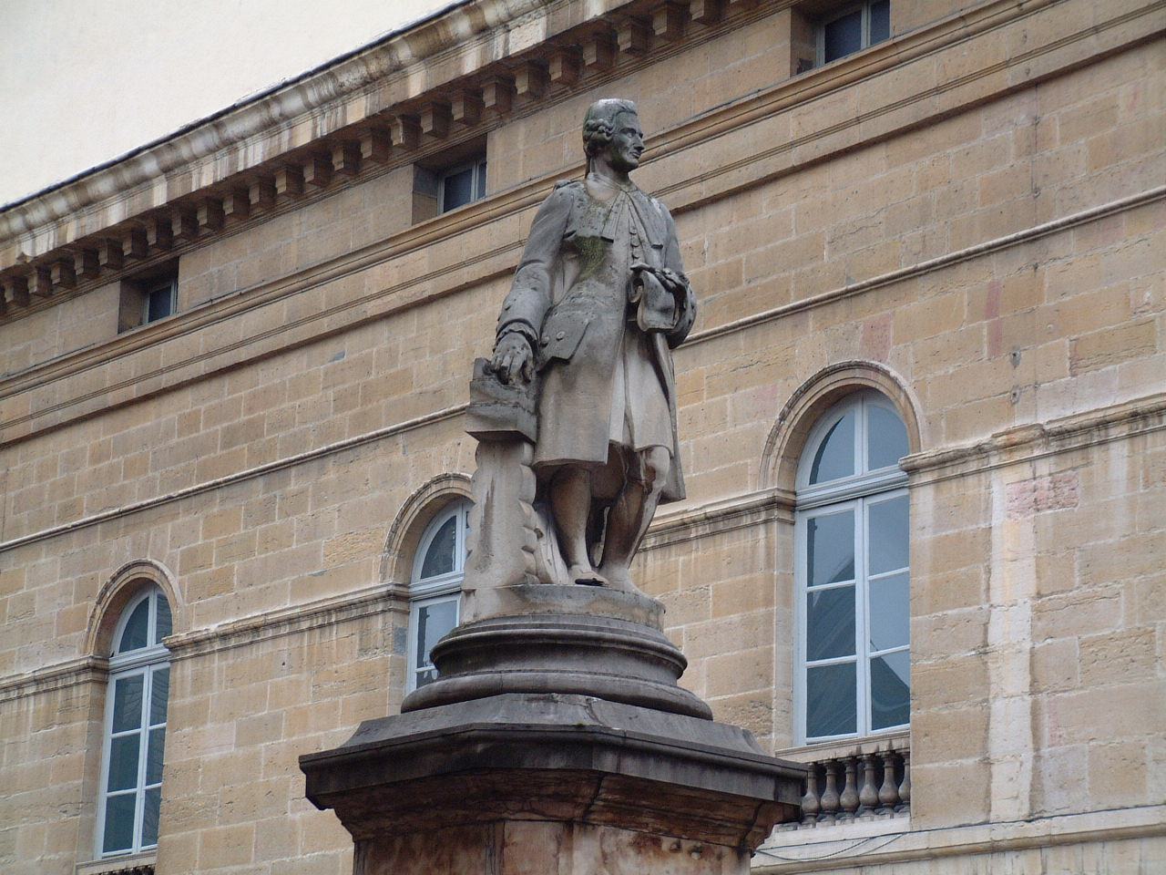 Statue de Jean-Philippe Rameau à Dijon prise le 12-2-2005 Pixeltoo 15 fev 2005 à 21:00 (CET)